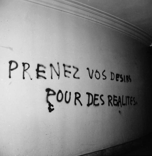 Mur (Sorbonne ?) : "Prenez vos désirs pour des réalités" - Photographie, 6 x 6 cm - BnF, département Philosophie, histoire, sciences de l'homme, Lb61-600 (Tracts mai 1968)